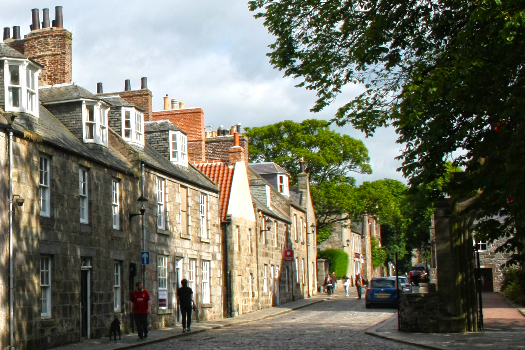 Old Aberdeen